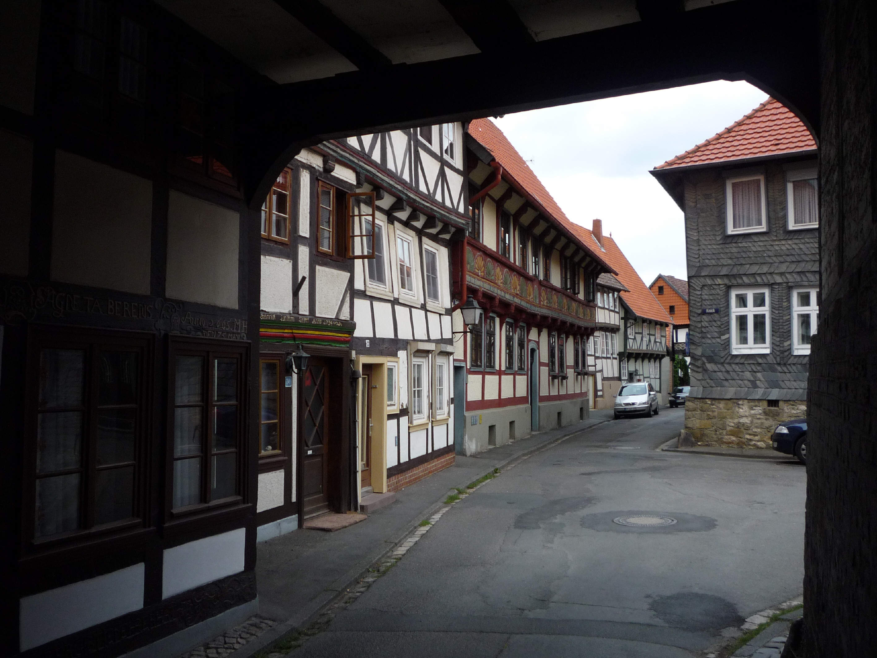 Dammtor und Damm (Straße) in Hornburg, Landkreis Wolfenbüttel. Das Dammtor wurde im 16. Jahrhundert als eines von ehem. fünf Stadttoren erbaut.